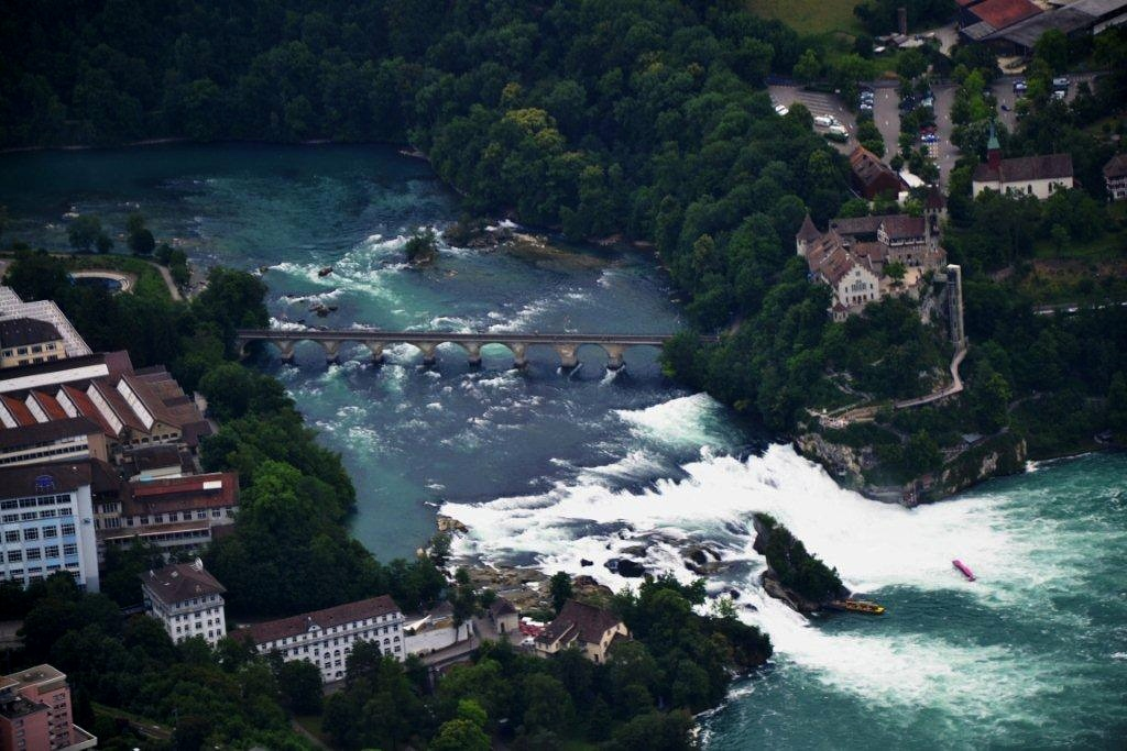 Rheinfall Flugaufnahme durch Rene und Doris Hostettler, Bearbeitung Bild ch-info.ch frei verwendbar unter Quellenangabe!